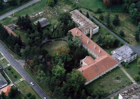 Öreglak, Hungary, aerialphotography